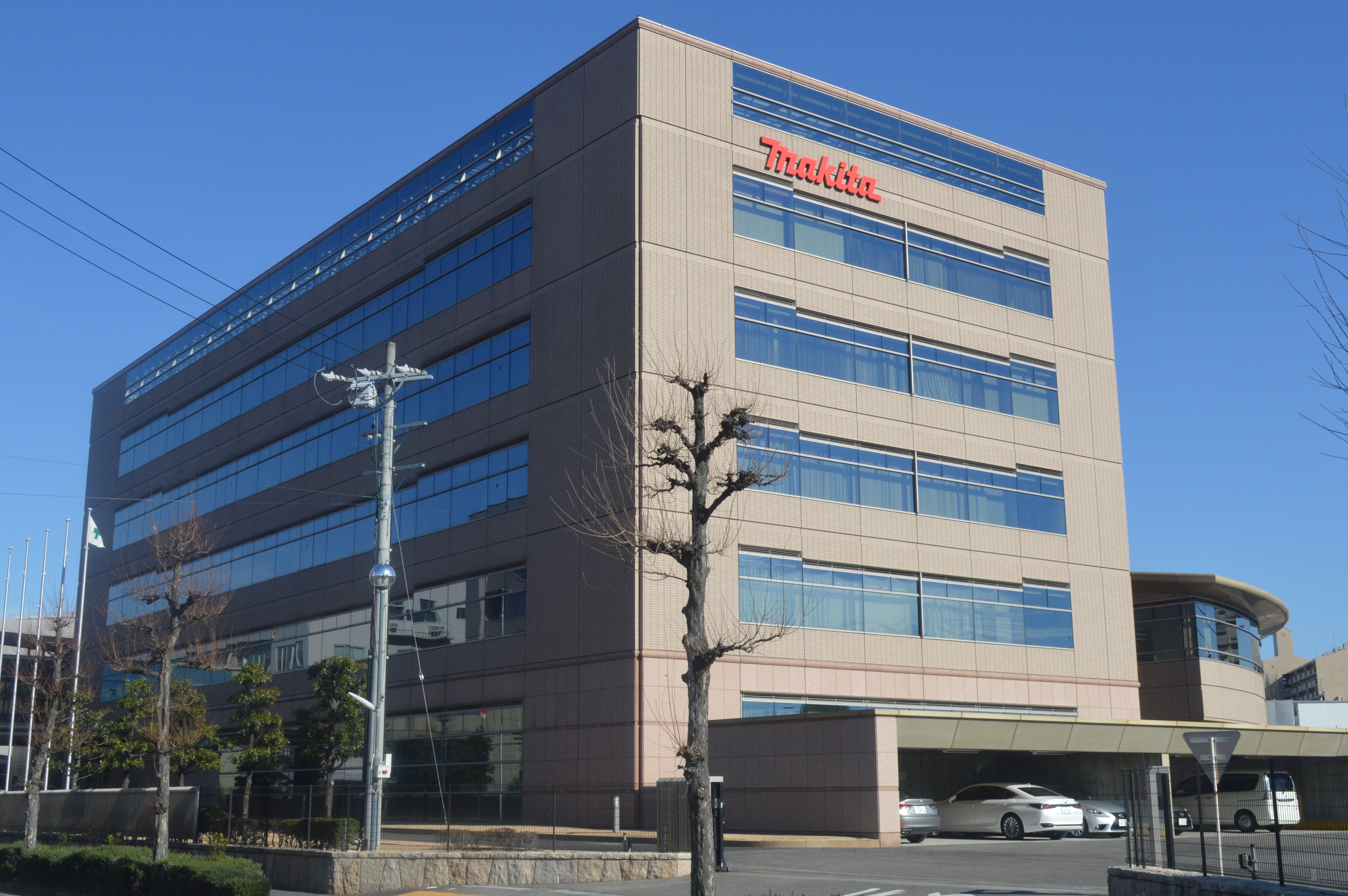 愛知県安城市にある株式会社マキタ本社。